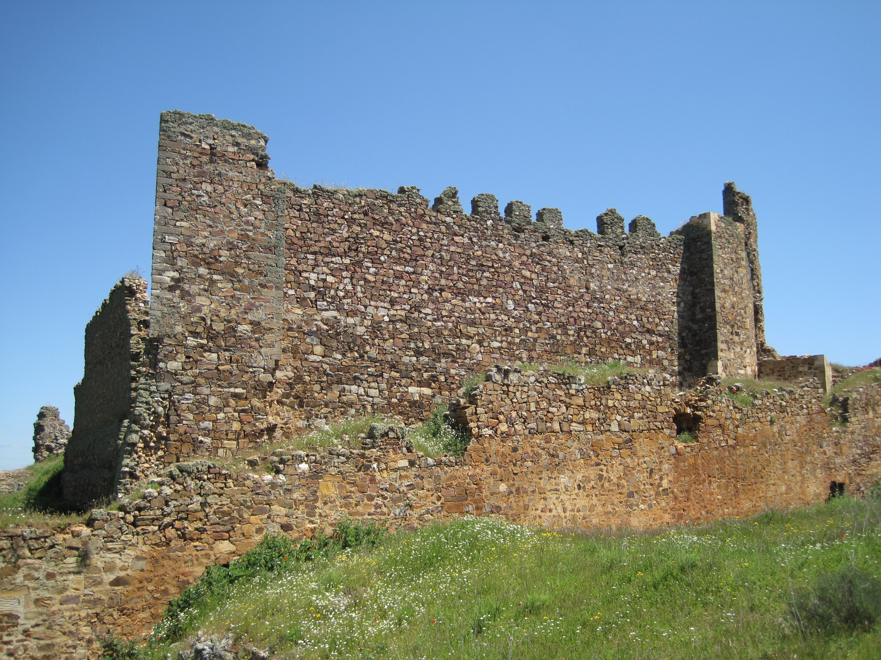 Vista del ángulo suroeste del castillo de Castrotorafe (Zamora, España).